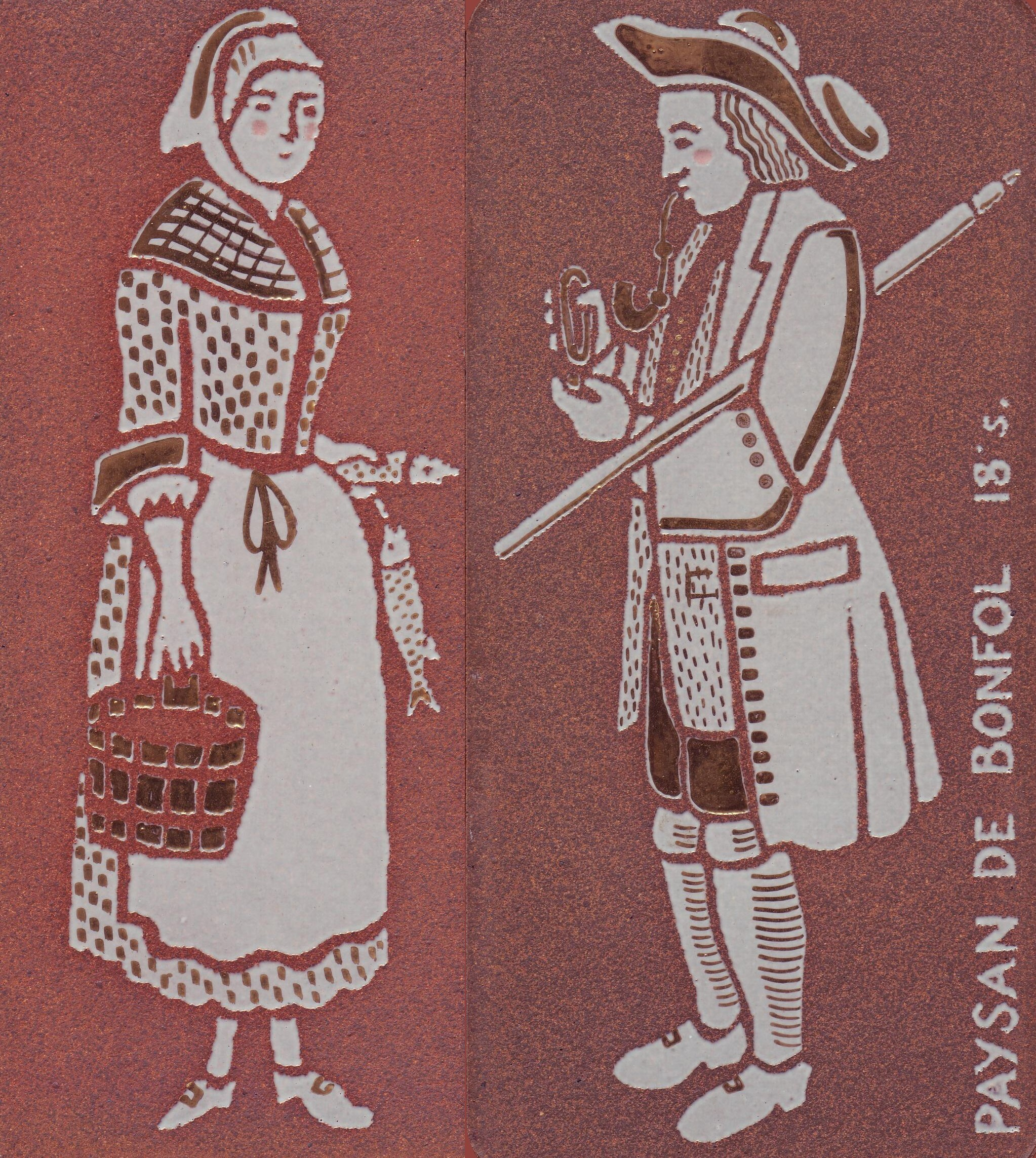 Paysanne et paysan de Bonfol, 18e siècle Dessin sur céramique Photo personnelle